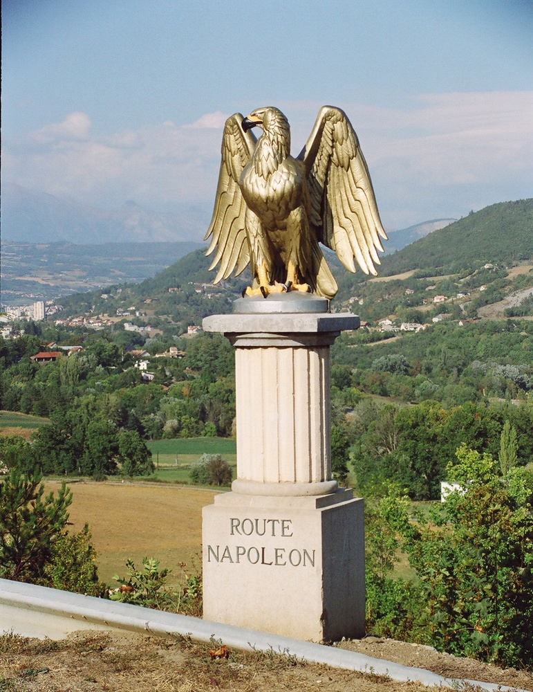 Stèle sur la route Napoléon (à l'entrée sud de Gap)